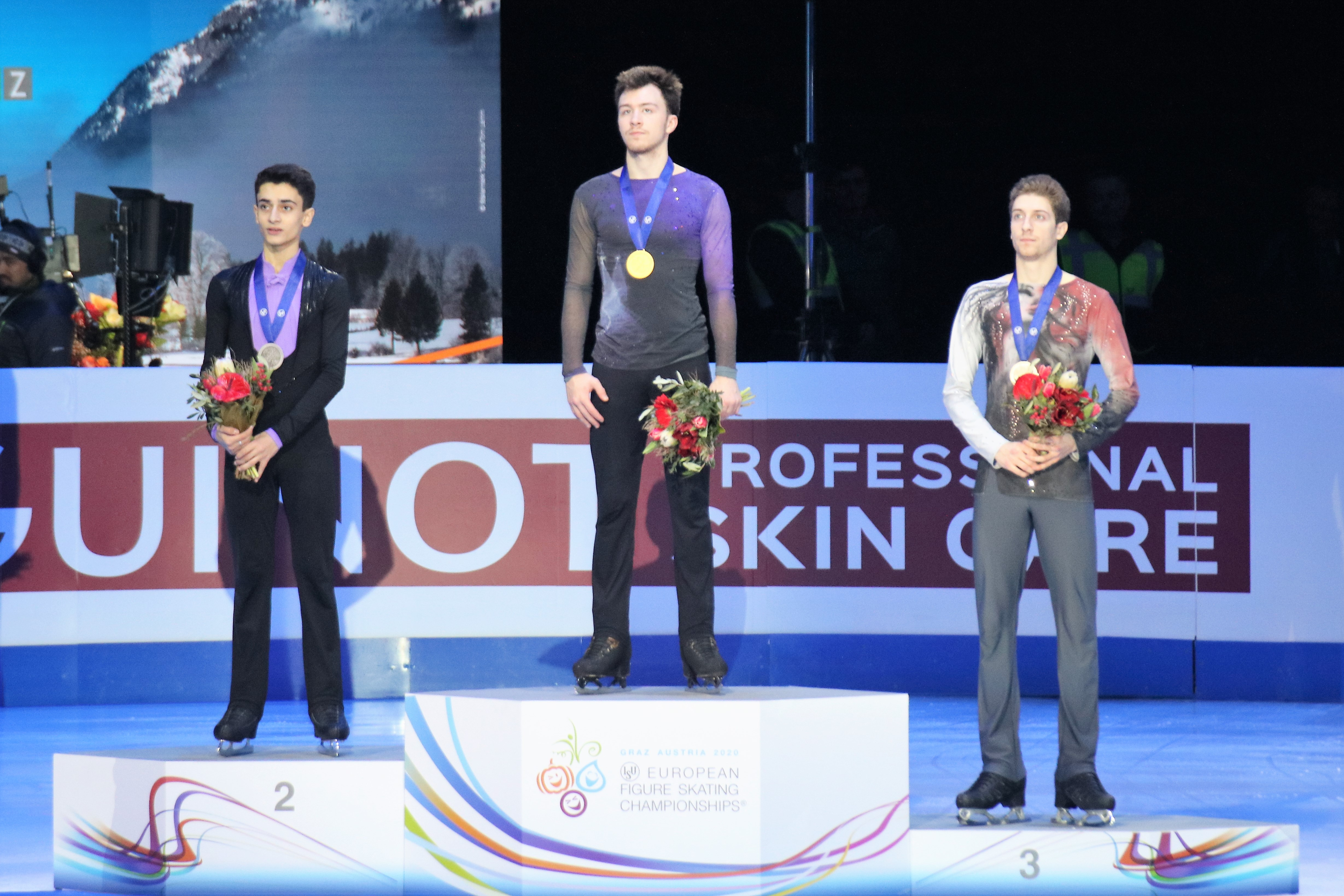 Церемония награждения в мужском одиночном катании на чемпионате Европы по фигурному катанию 2020